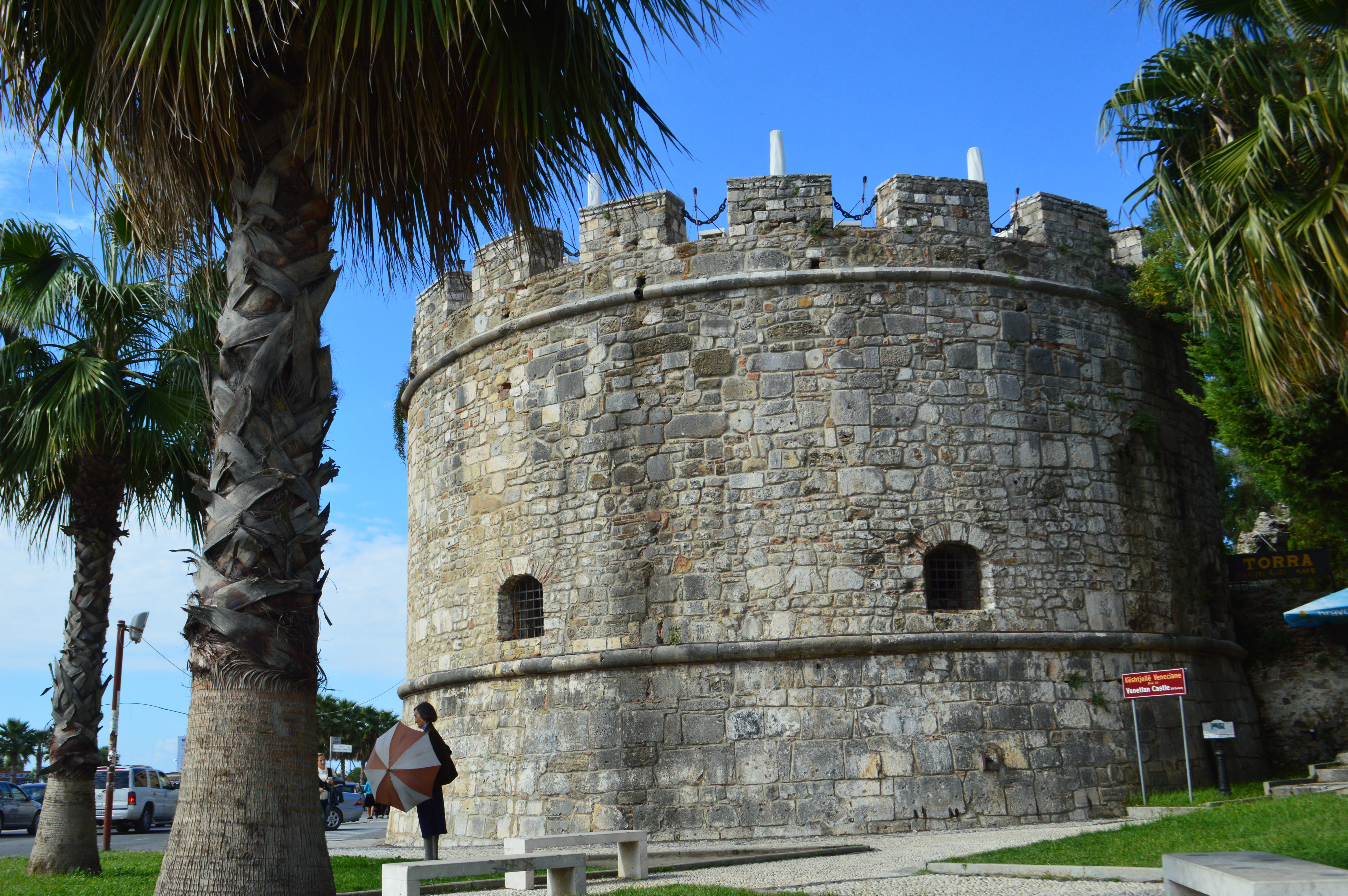 Benátská věž v Drači, Albánie